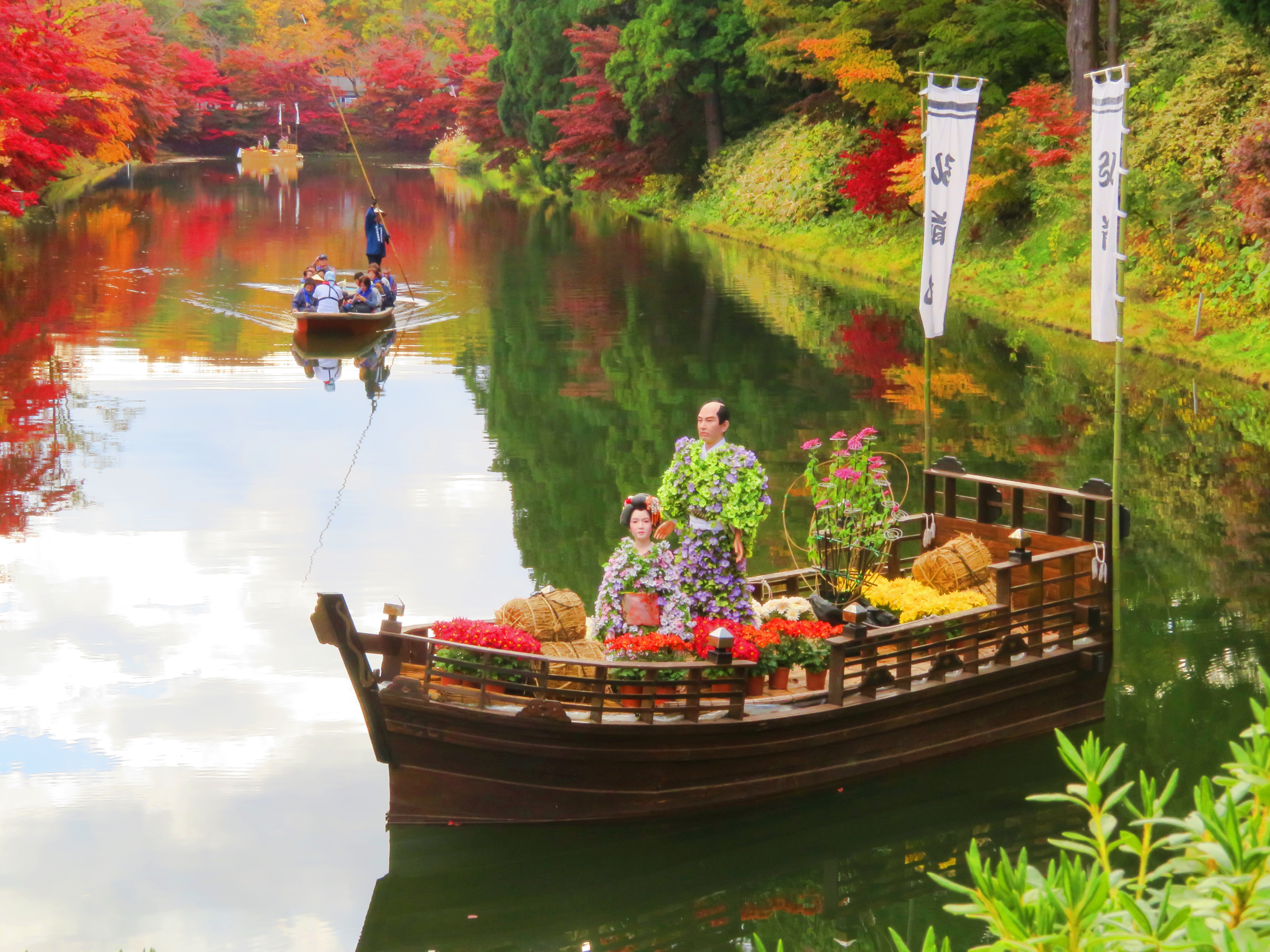 弘前城菊と紅葉まつり Canon PowerShot SX720 HS